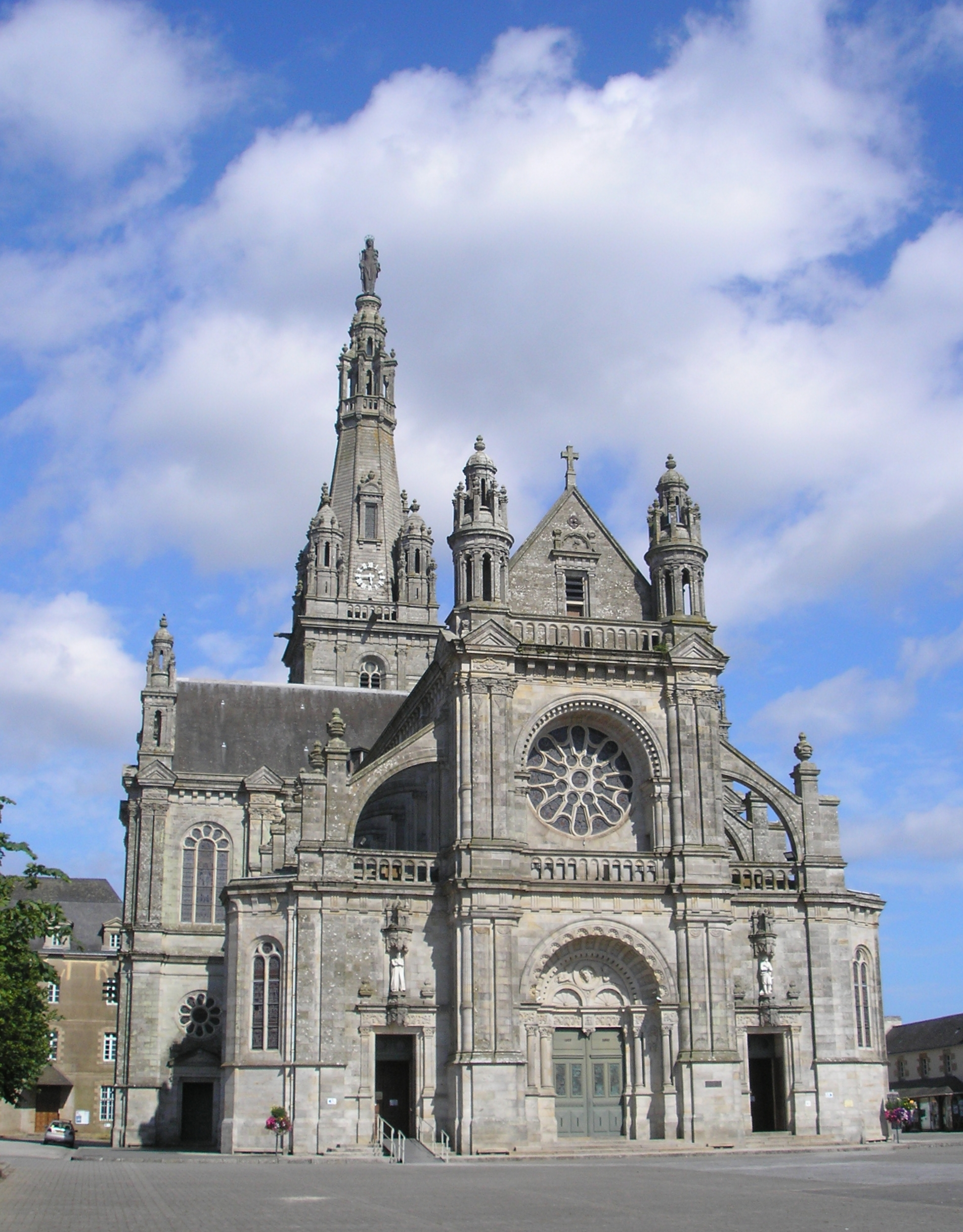 Sainte-Anne-d'Auray (Bretagne, France). La basilique.